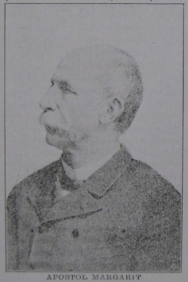 Апостол Маргарит, портрет от Македонорумънски алманах, 1902